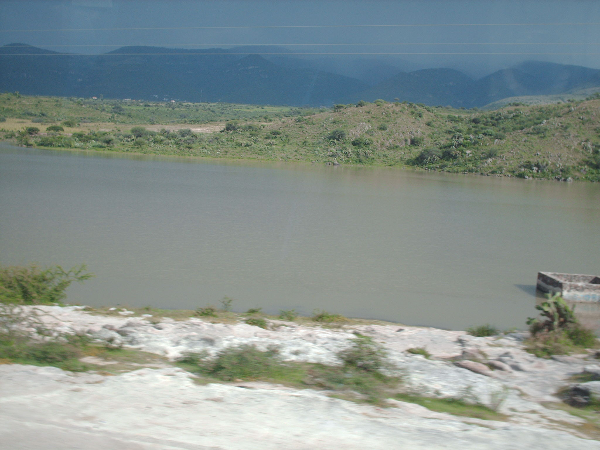 Presa Ignacio Allende en Guanajuato, México